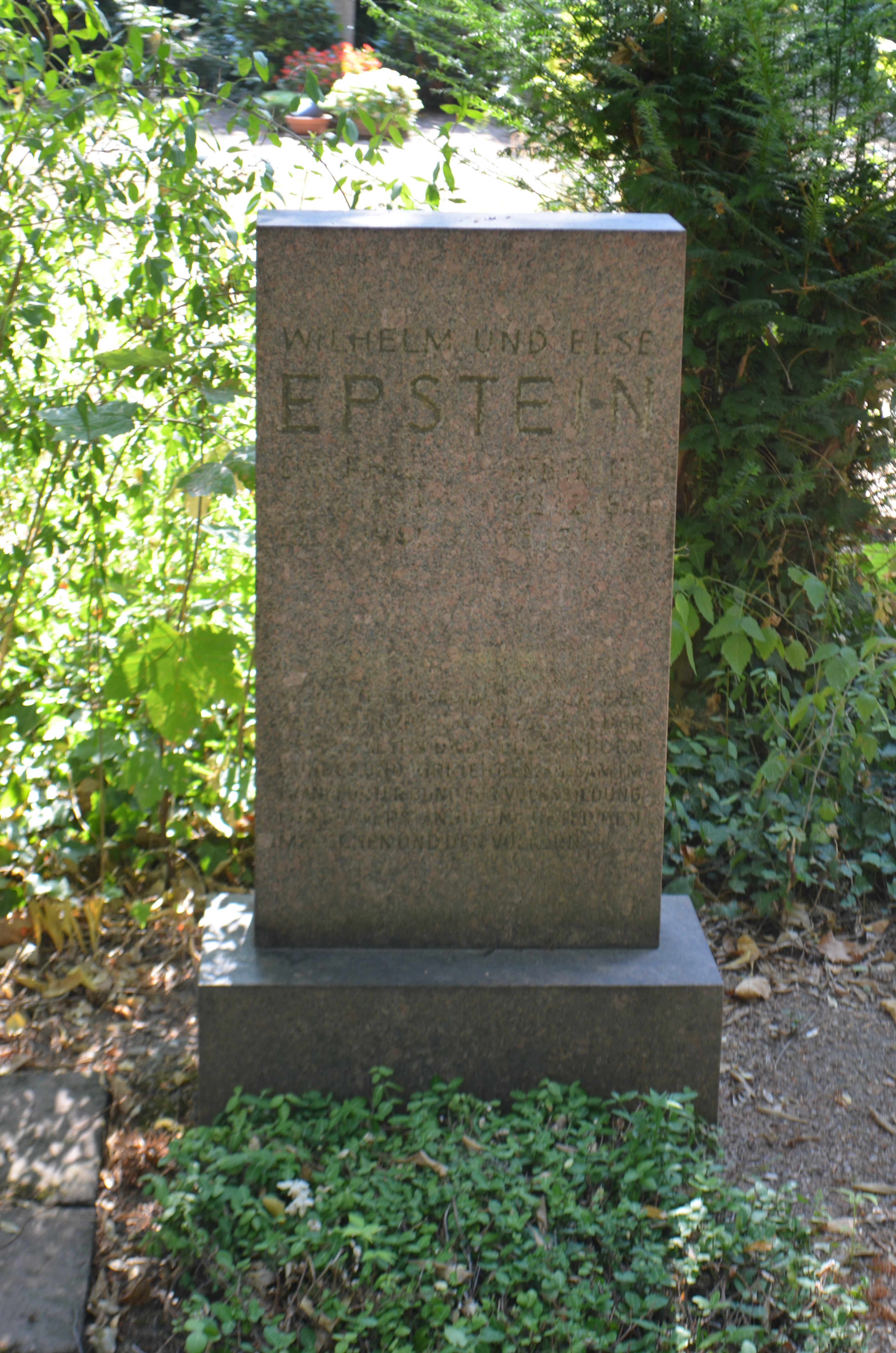 Frankfurt, Hauptfriedhof, Ehrengrab J Maria Elisabeth Epstein